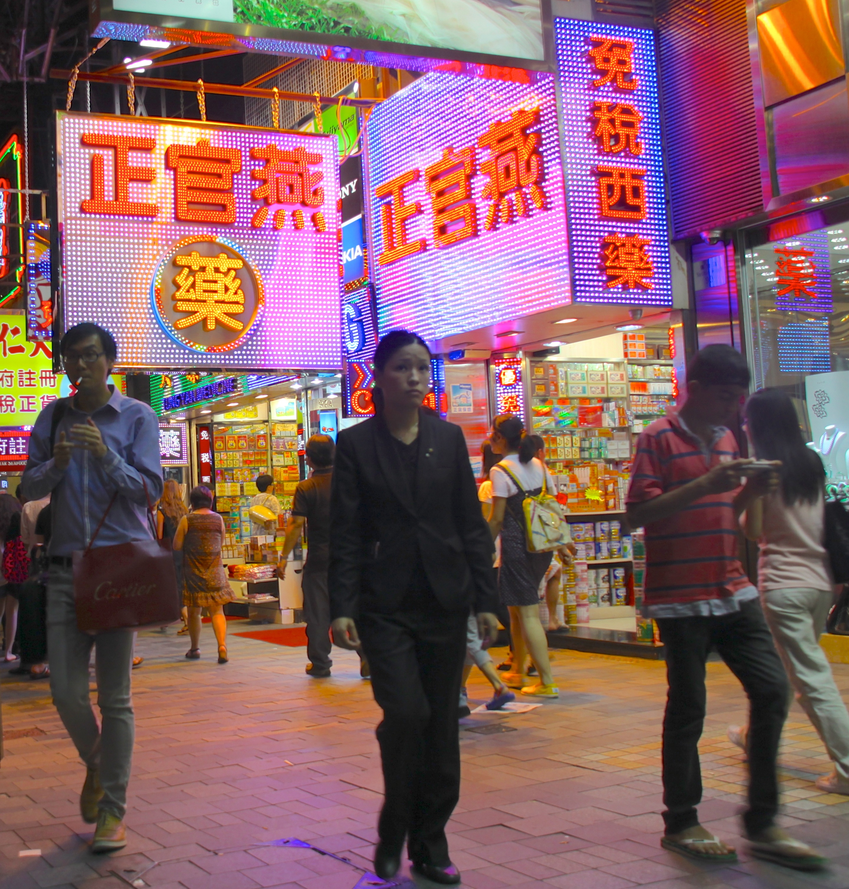 Lung Yeuk Tau Heritage Trail